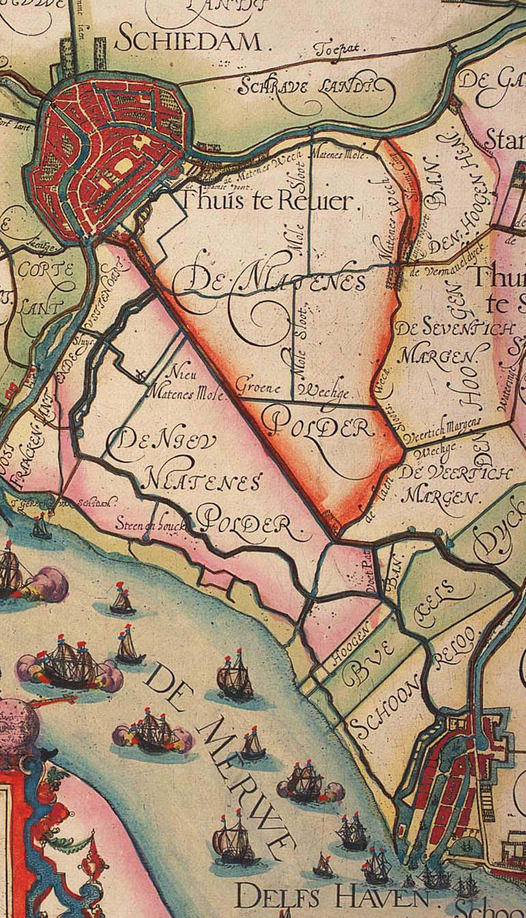 Detail uit de kaart van Schieland van 1611 van Floris Balthasarsz. van Berckenrode.